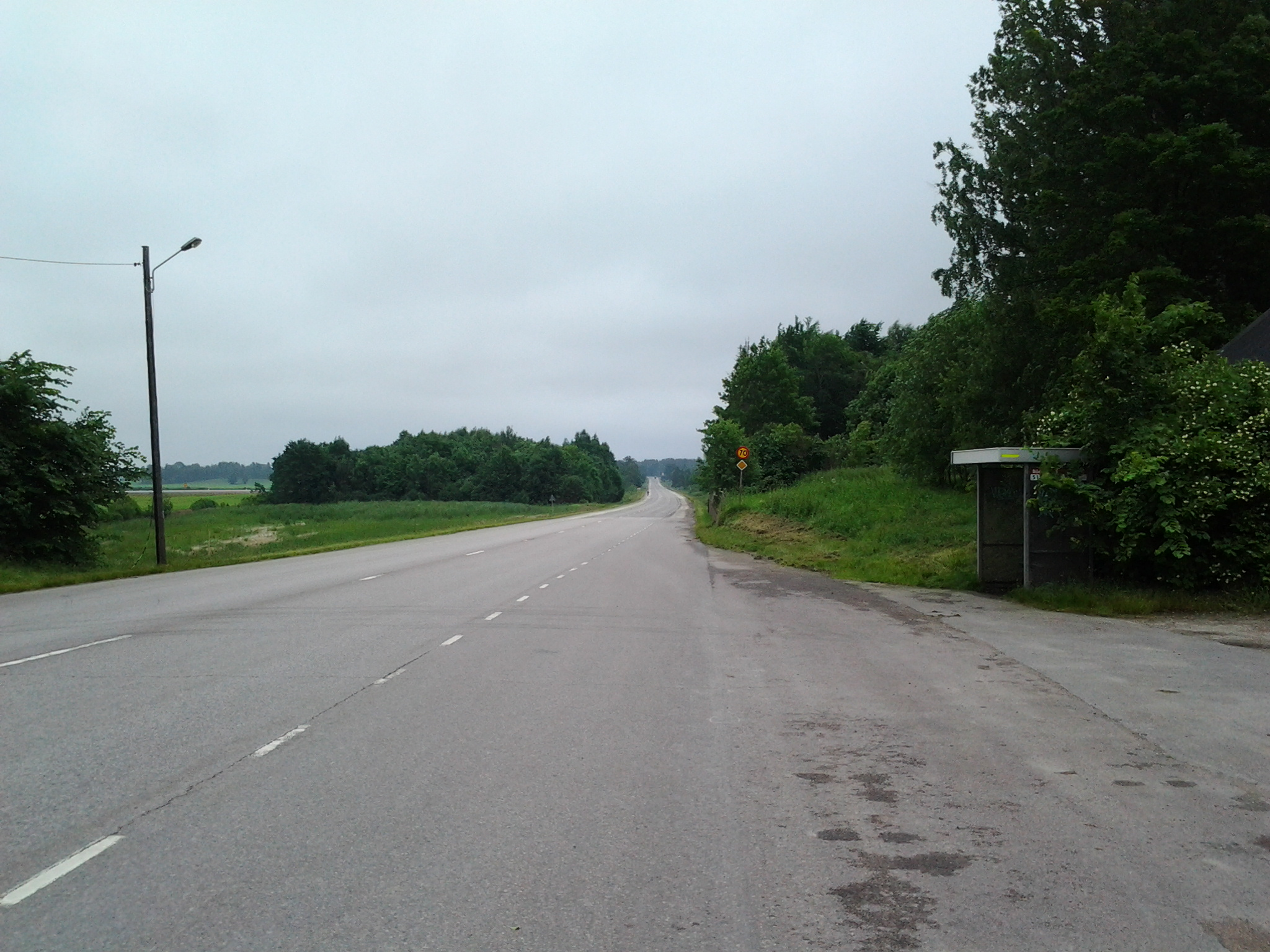 Länsväg T 691 i Örebro län, före detta E18. På bilden syns den så kallade "flygrakan" mellan Sanna och Bäck.